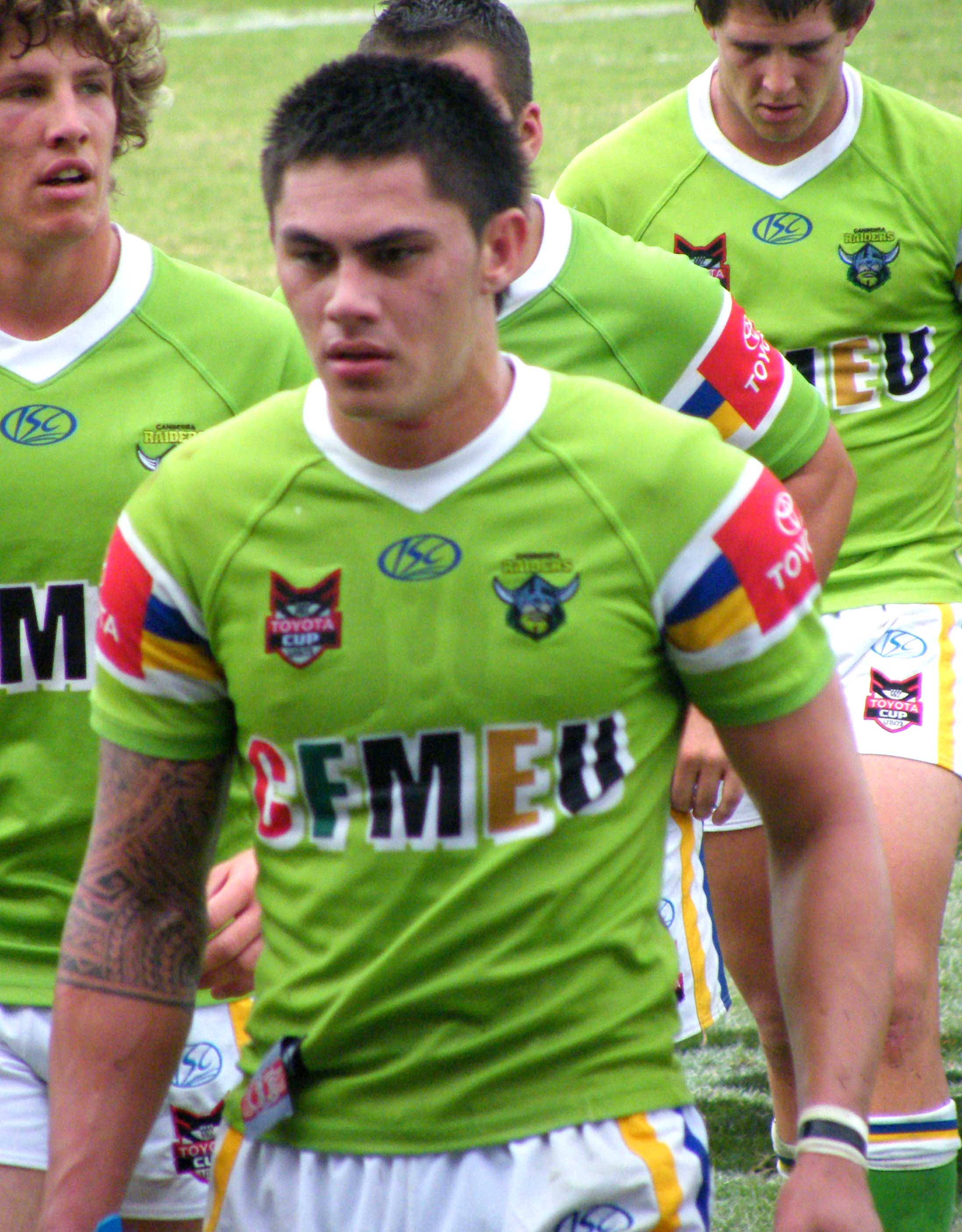 Daniel Vidot